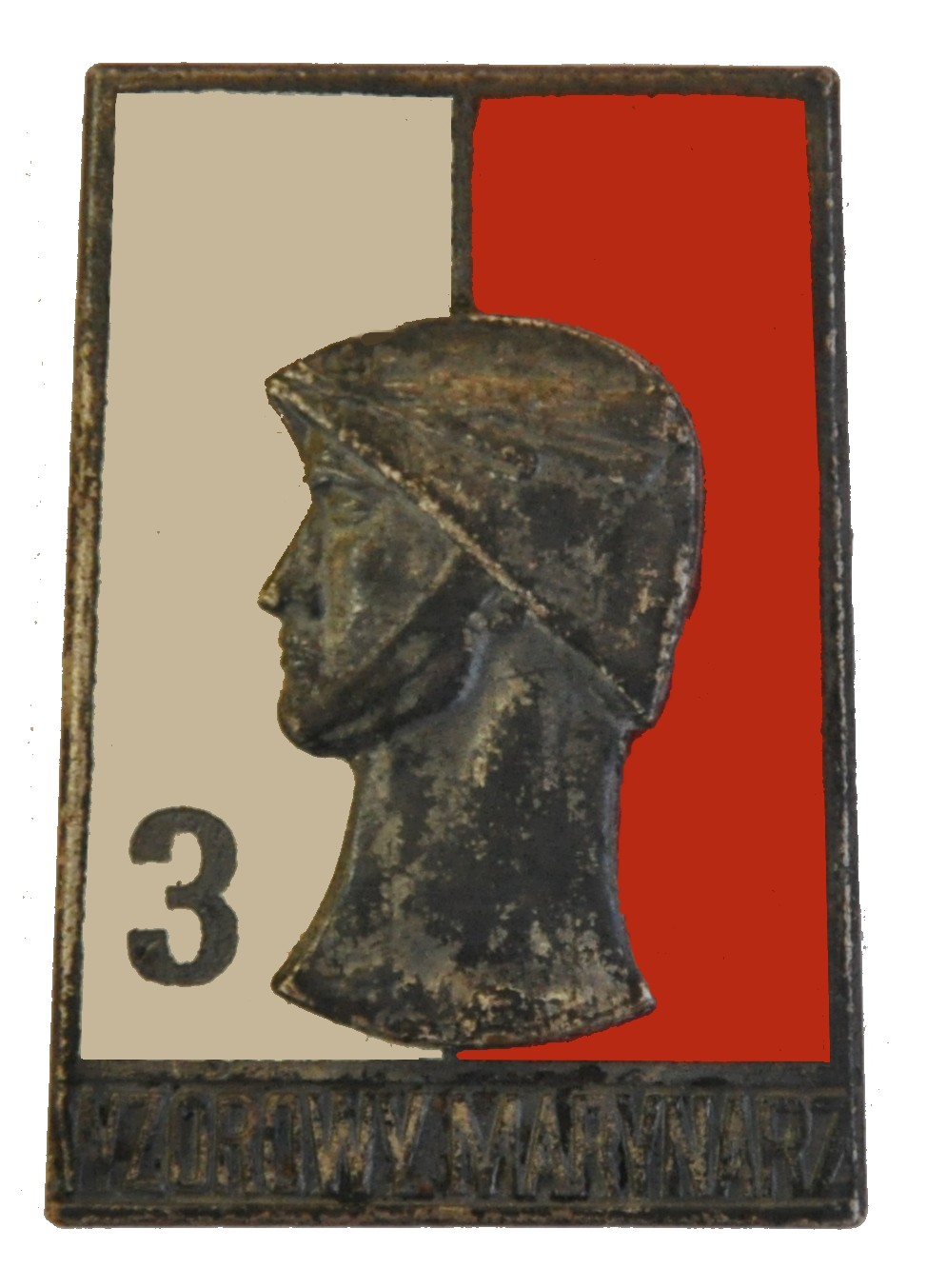 Odznaka Wzorowy Marynarz 3 stopnia